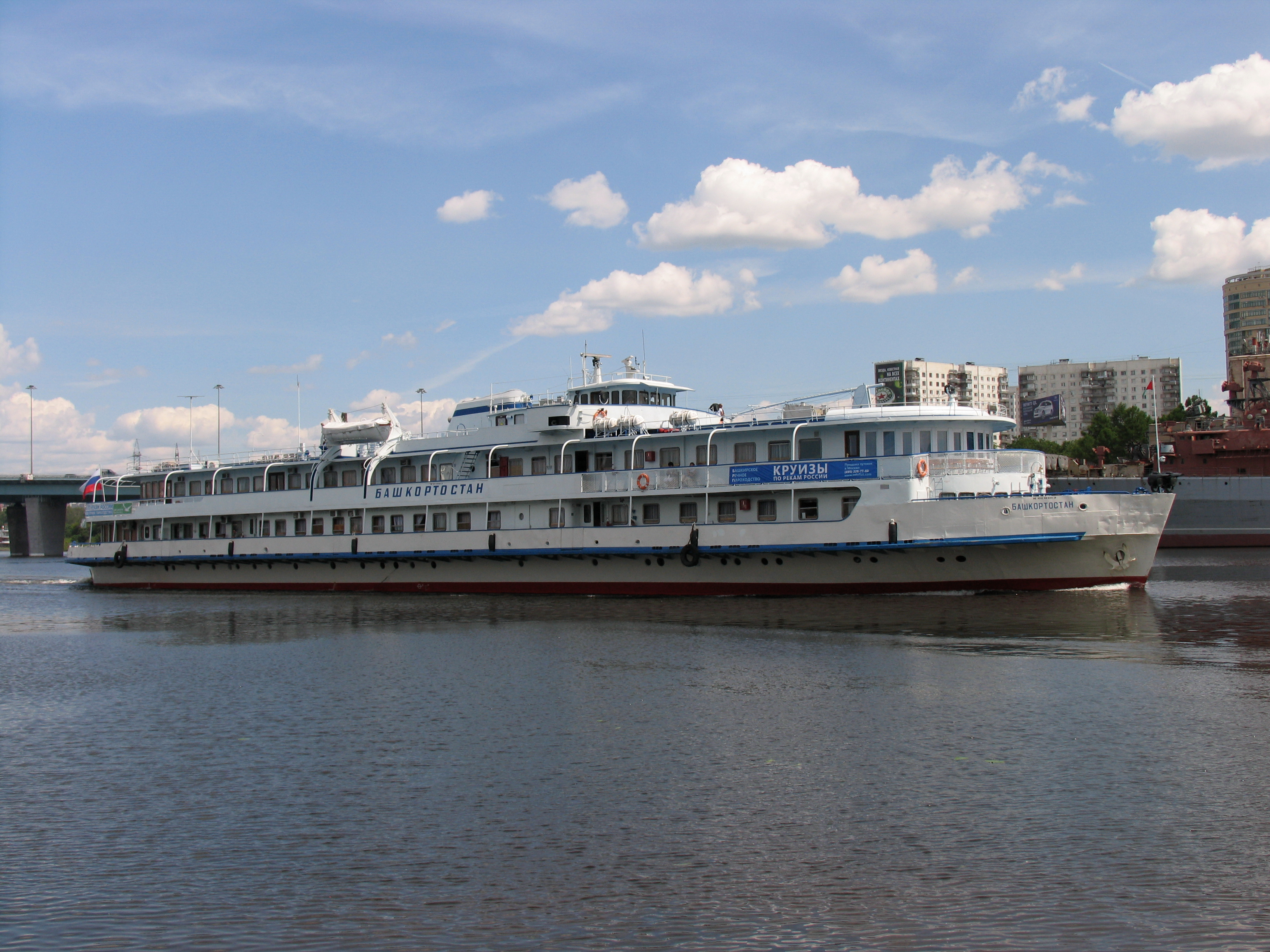 Речной двухпалубный круизный теплоход "Башкортостан" на Химкинском водохранилище.